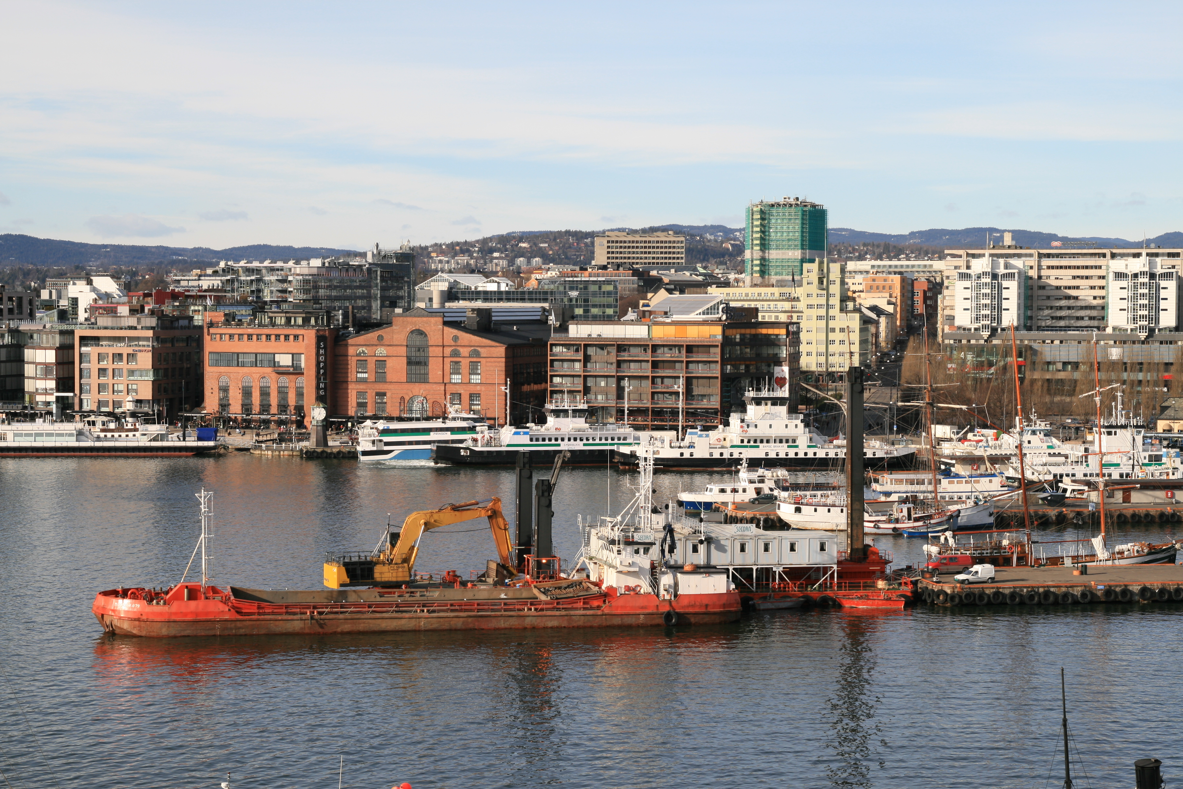 Aker brygge seen across the Piperviken inlet. --- En mudderpram fortøyd i Piperviken. Tidligere var det Bjørviken som gav skipsfarten tumleplass i Oslos havnebasseng, men i dag har nytt Operabygg og andre prosjekter krympet fjordarmen slik at det faktisk er Piperviken som er størst.